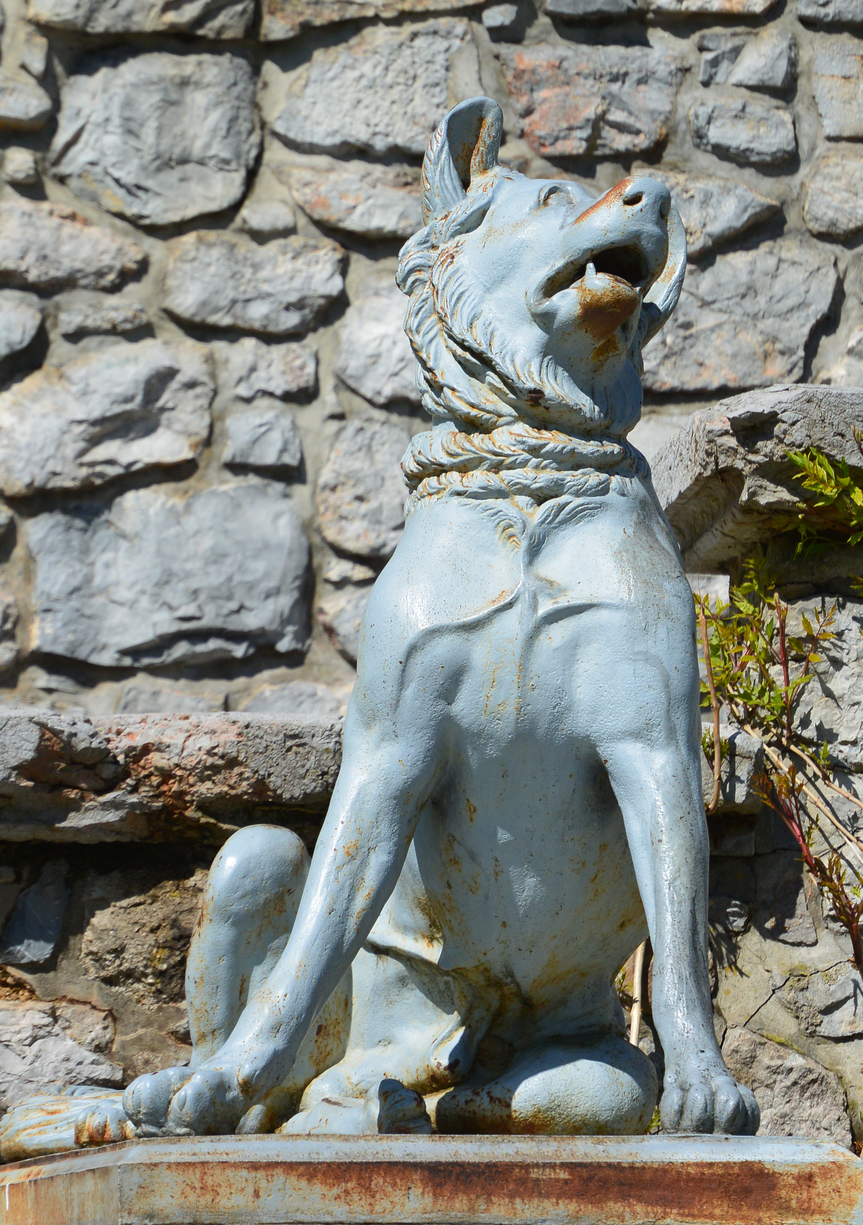 Laibach